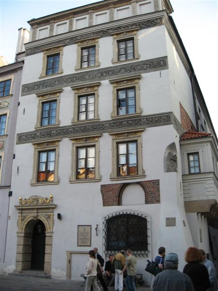 The house under the St. Anne at Old Town Market Square in Warsaw.